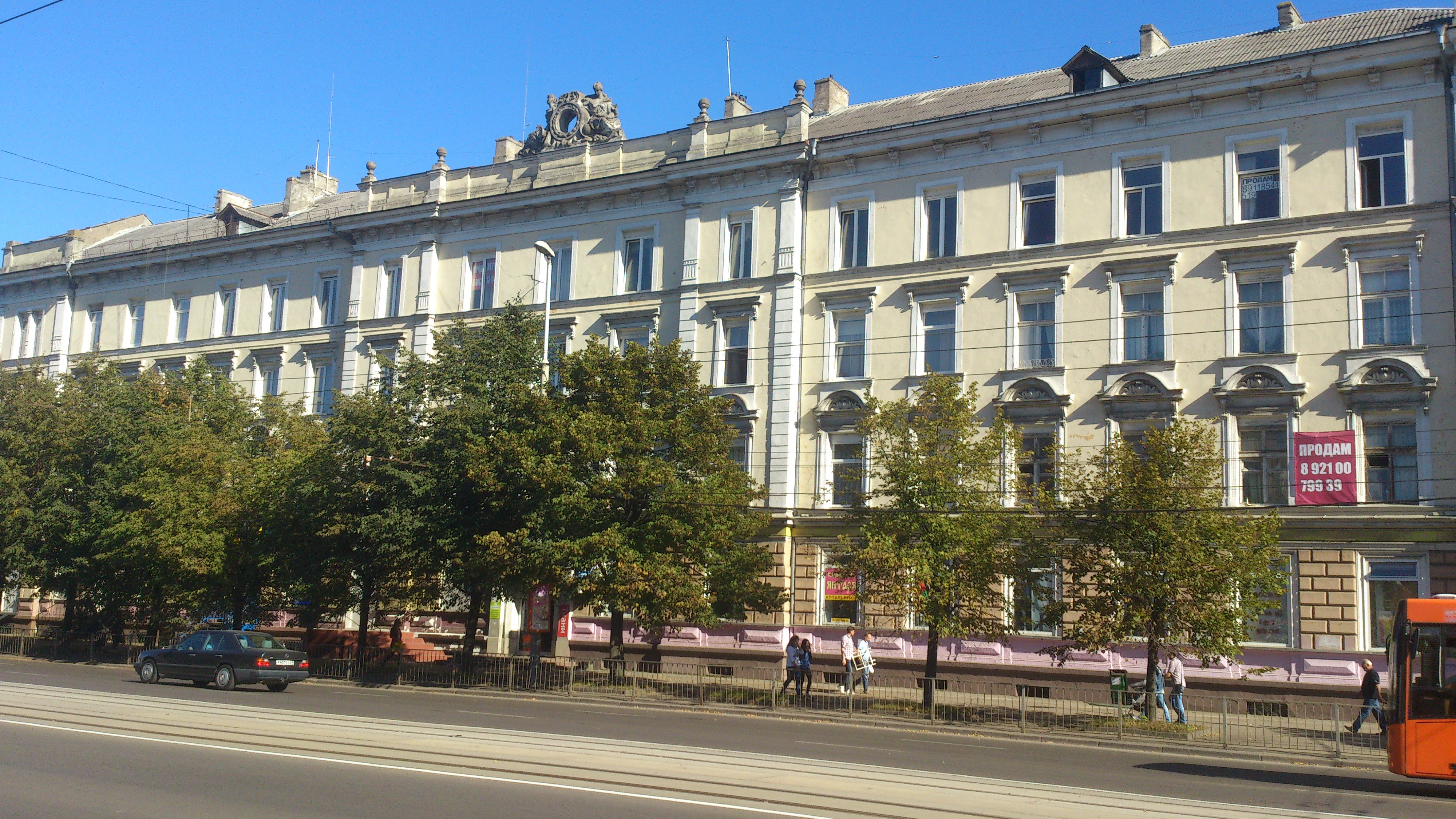 Здание дирекции железной дороги с двумя женскими скульптурами на портале: проспект Ленинский, 111-117, Калининград, Калининградская область